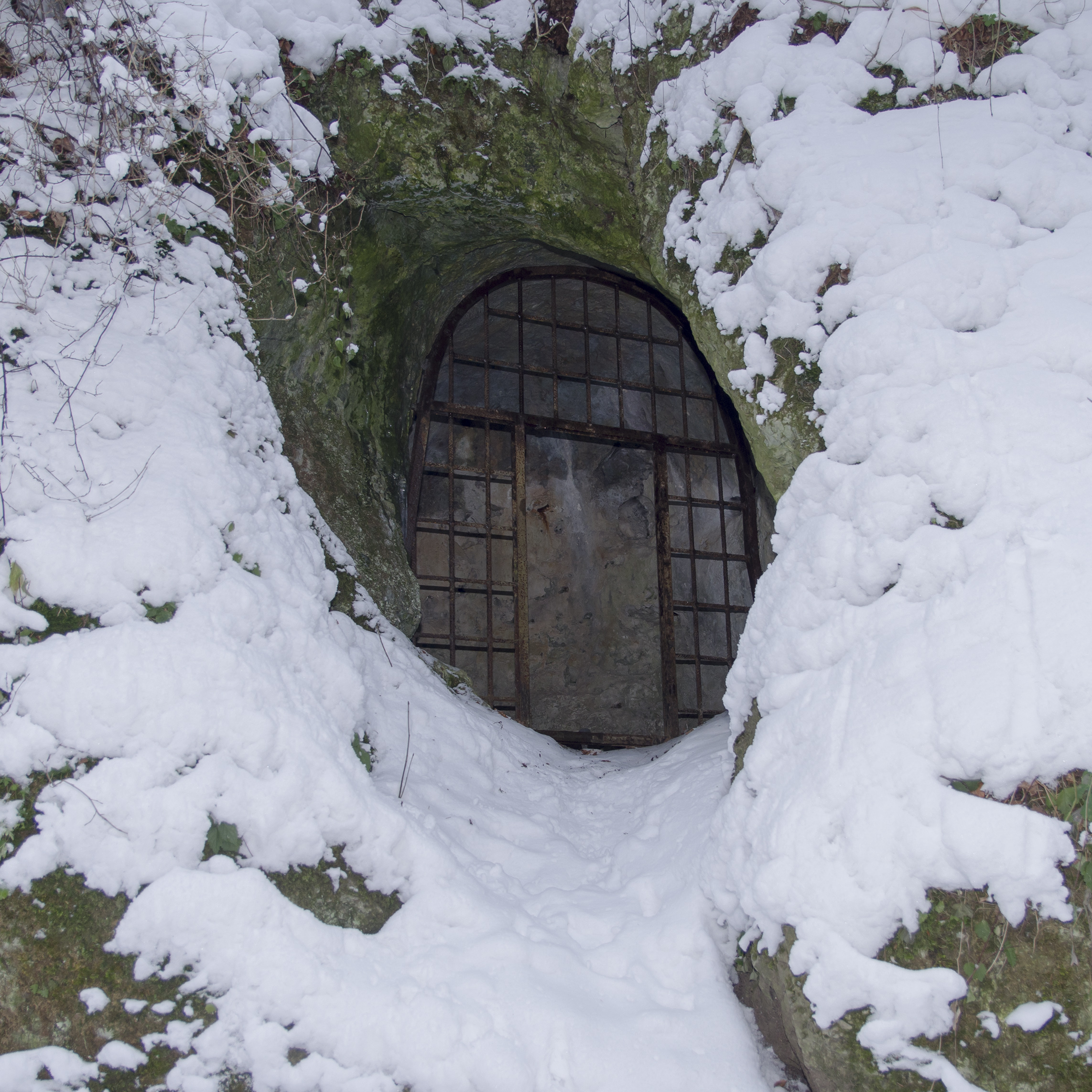 Jaskinia Psia (Dolina Wodącej)